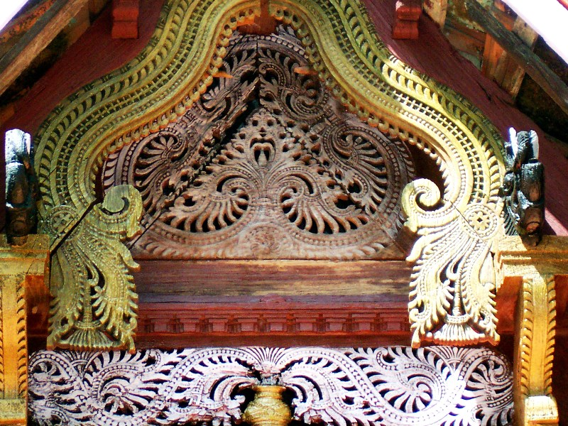 1836 ഇൽ പണിത ഒരു നാലുകെട്ടിന്റെ മേൽക്കൂരയിൽ ഉള്ള കൊത്തുപണി